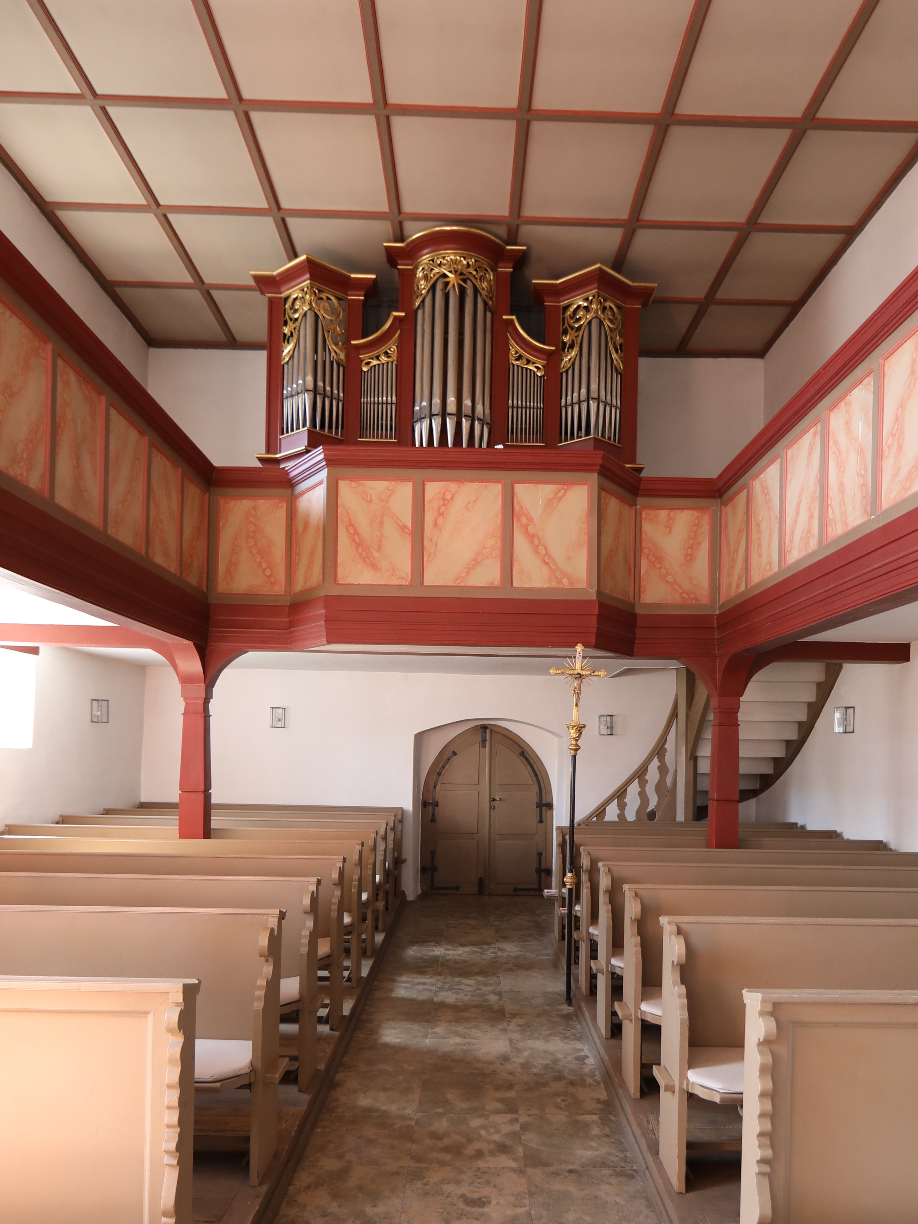 Evangelische Pfarrkirche Unserer Lieben Frau in Seidmannsdorf